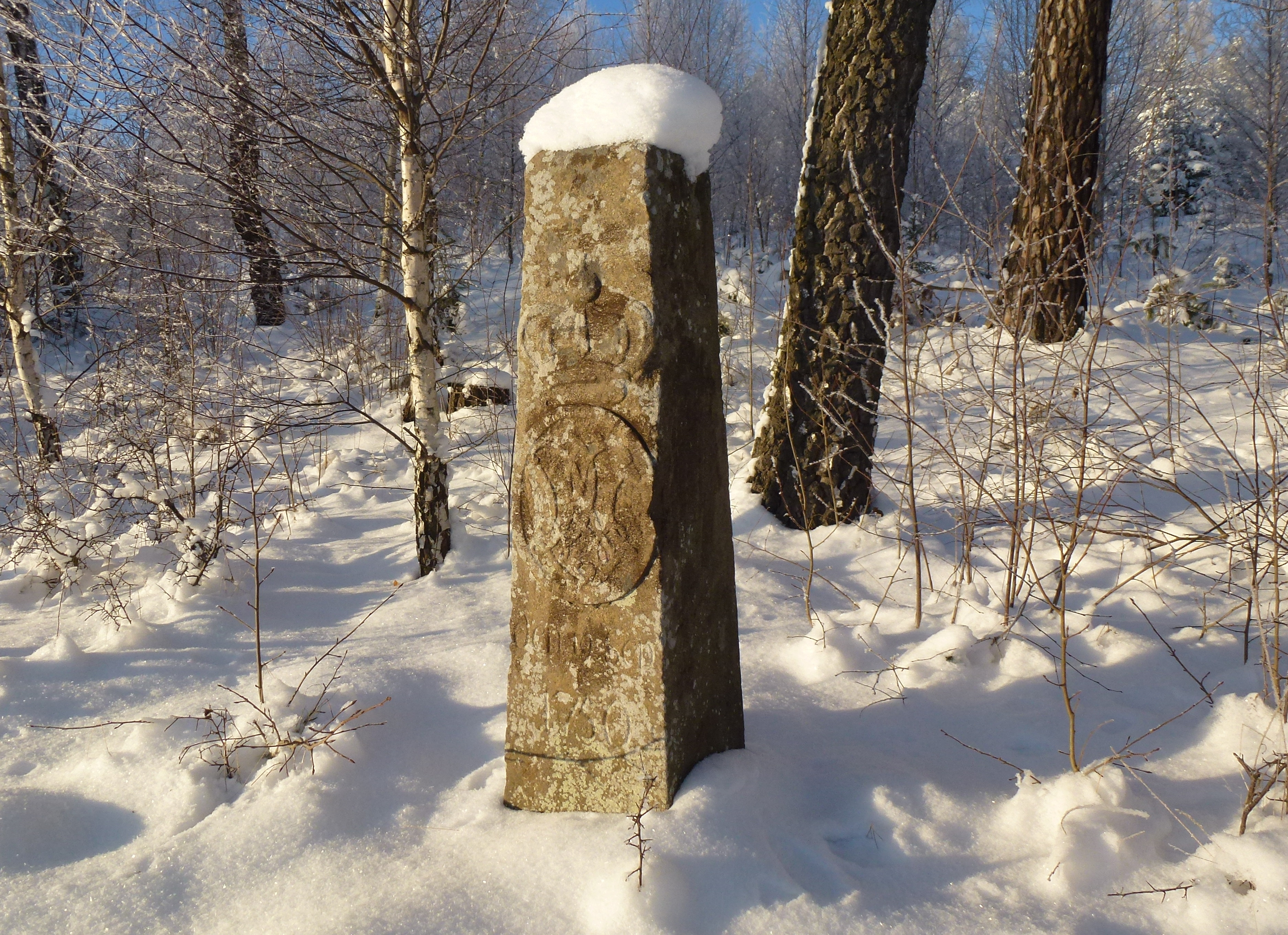 Minnessten vid Wallenbergs Alle (gamla Ekerövägen). Minnessten: gråsten, 1,2 m h 0,30x0,3 m vid basen och 0,22x0,22 m vid toppen. Stenen bruten till en spets vid toppen. Inskrift framsidan: den 19 sep 1750 Inskrift baksidan: JUDITH Cap 15 vers 10:11 (RAÄ-nummer Lovö 3:1)